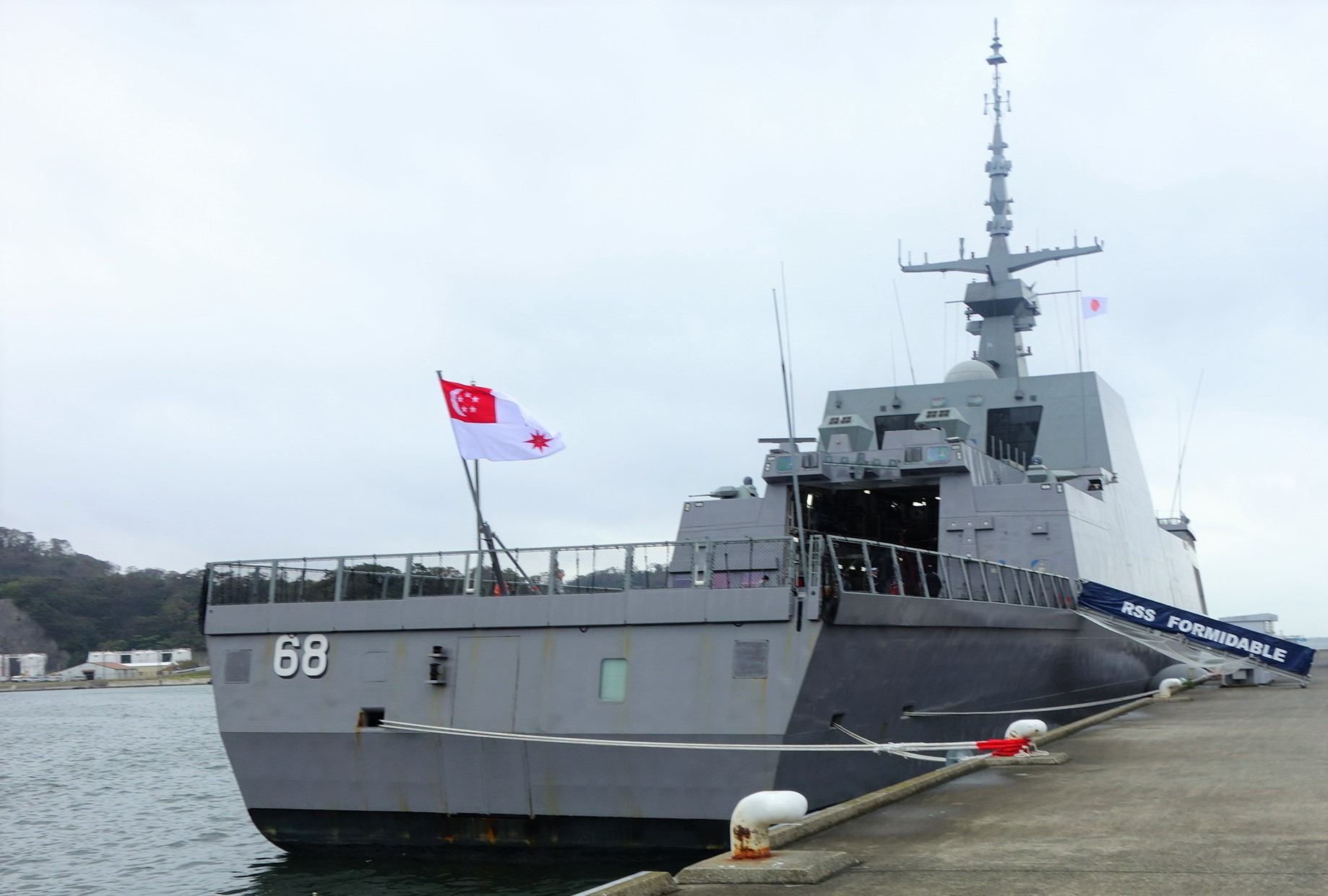 令和元年の観艦式に参加するために海上自衛隊横須賀基地に寄港した、シンガポール海軍のフォーミダブル級フリゲート1番艦のフォーミダブル。令和元年台風第19号のため観艦式は中止となり、横須賀基地での艦艇一般公開のみとなった。フォーミダブルは一般公開はされず、外観のみの展示であった。艦尾方向からの撮影。シンガポール海軍の海軍旗とヘリコプターの格納庫が見える。